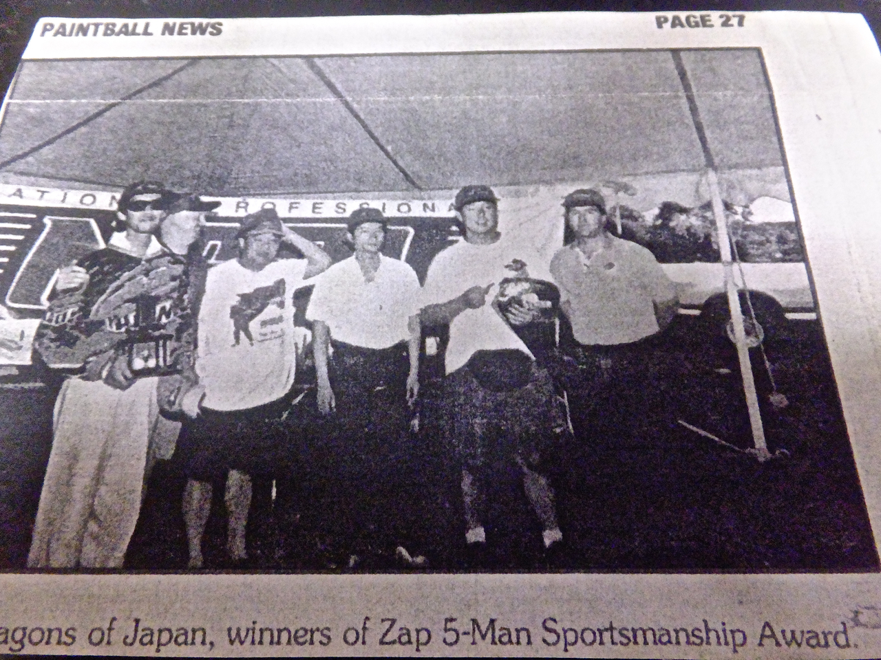 1996年のNPPLシカゴ・トーナメントでFAR EAST DRAGONSがSportsmanship Awardを受賞した事を報じたPAINTBALL NEWS誌の27ページの写真。